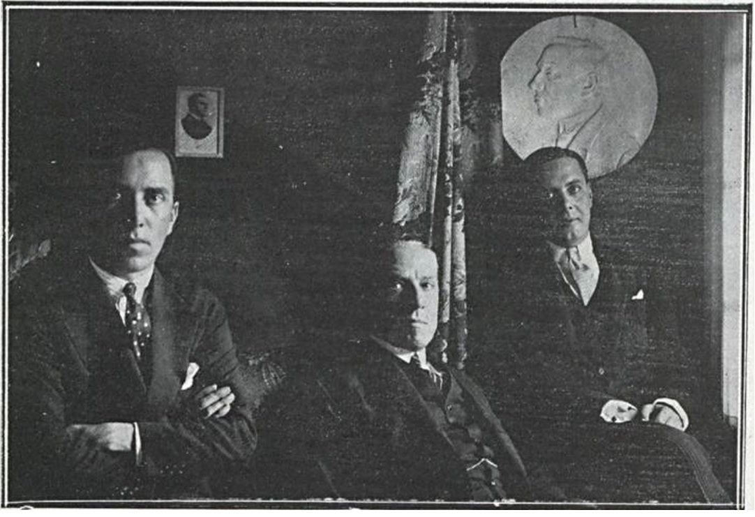 Os jornalistas Julio de Mesquita Filho e Nestor Rangel Pestana de O Estado de S.Paulo e o jornalista correspondente da agência United Press, sr. Comora.